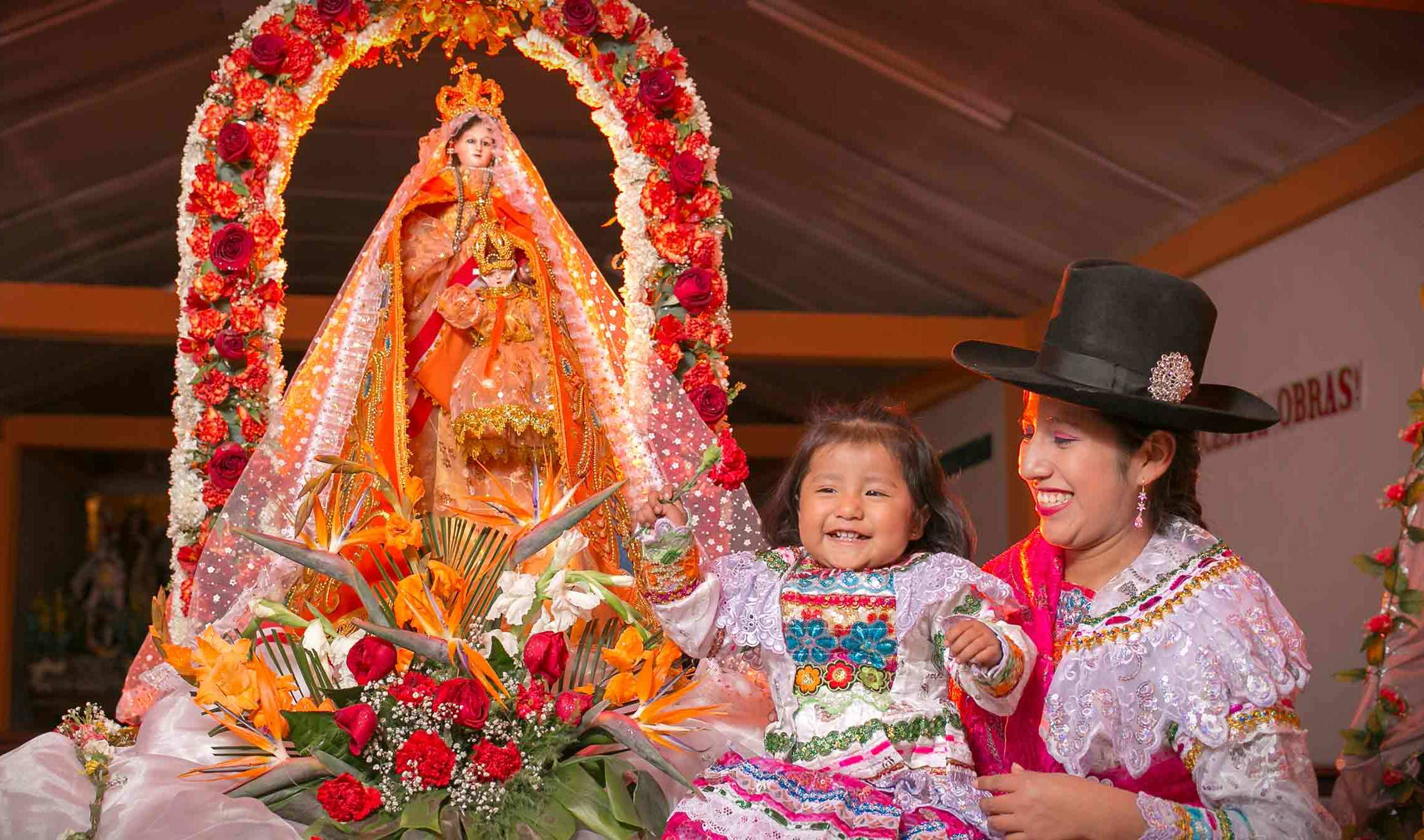 Festividad Patronal de Camilaca. Del 22 al 26 de Julio. Vemos en imagen a la imagen de nuestra patrona, a lado nuestras bellas camilaqueñas, devotas. Luciendo el traje originario y típico del distrito de Camilaca.